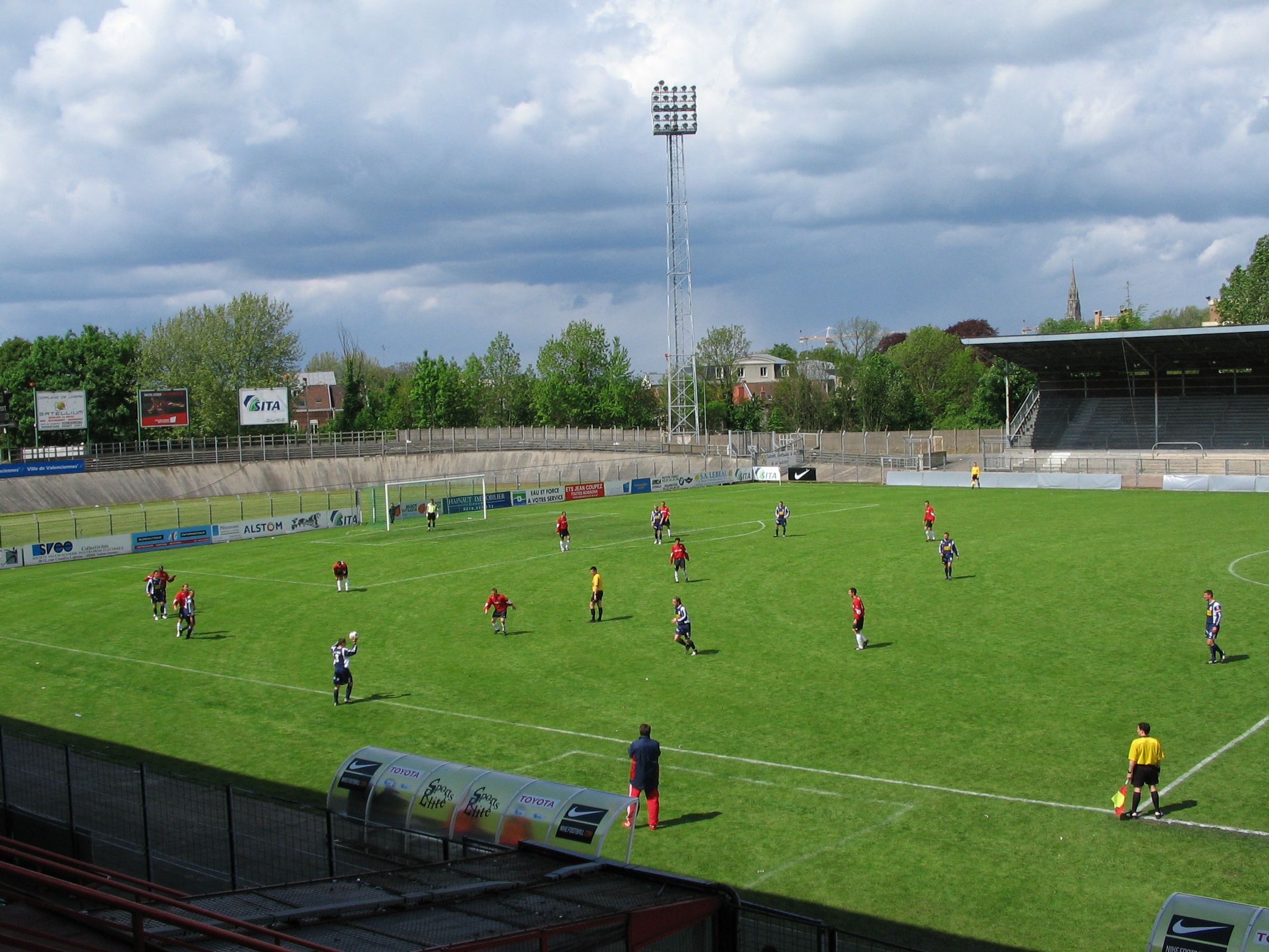 Match de l'équipe réserve, 08.05.2005. (la nouvelle tribune ouest n'est aménagée qu'en 2006)